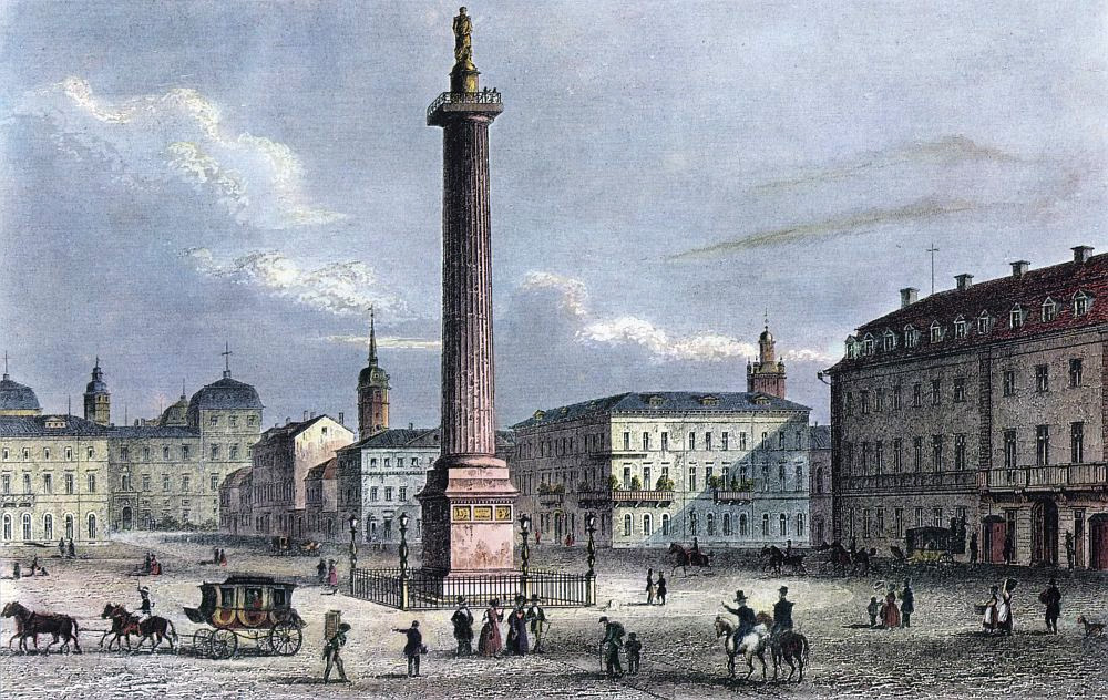 Ludwigsmonument in Darmstadt um 1840. Stahlstich von Poppel, nach einer Zeichnung von Jakob Meinrad Bayrer.